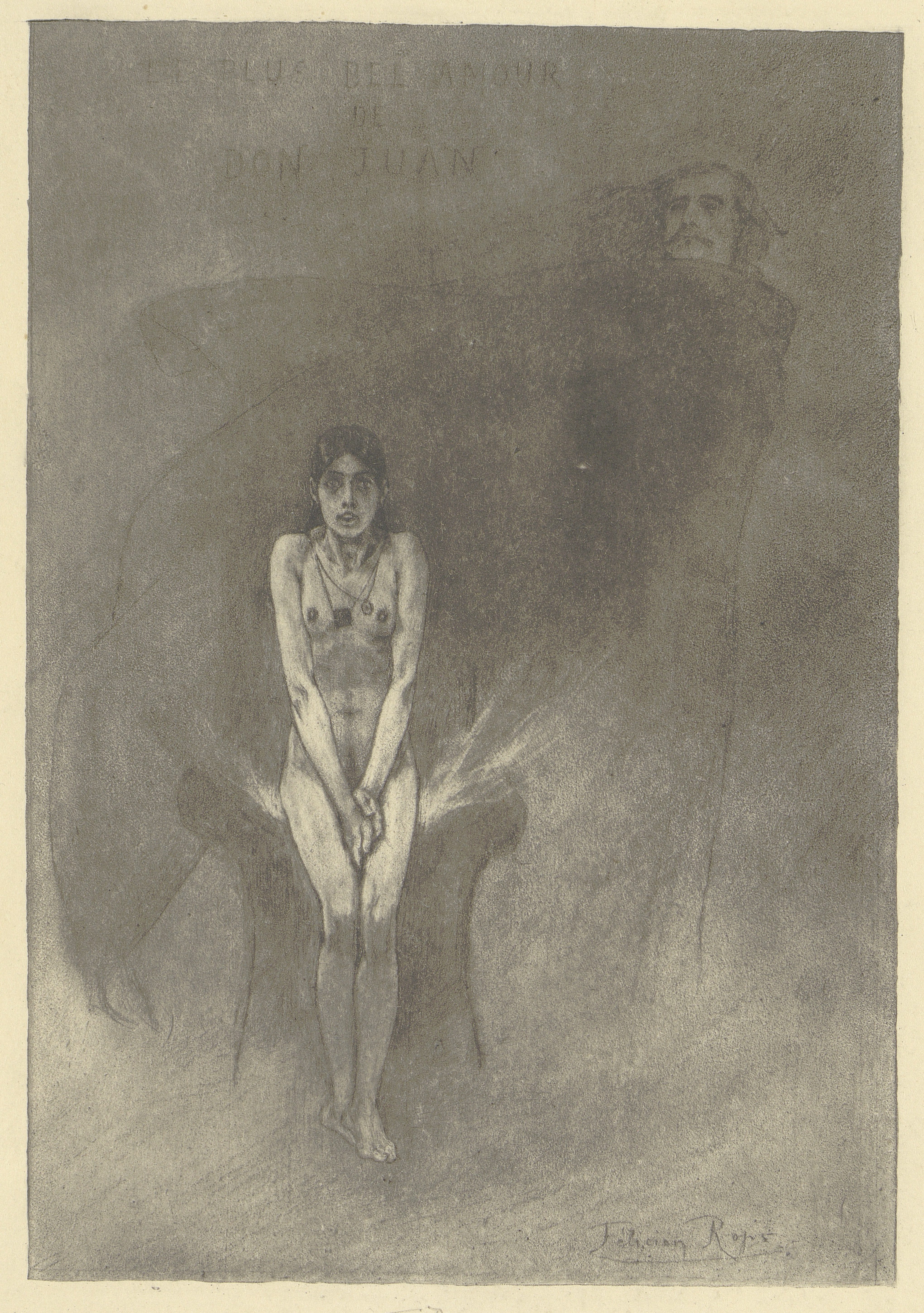 Illustration pour "Les Diaboliques" de J. Barbey d'Aurevilly].